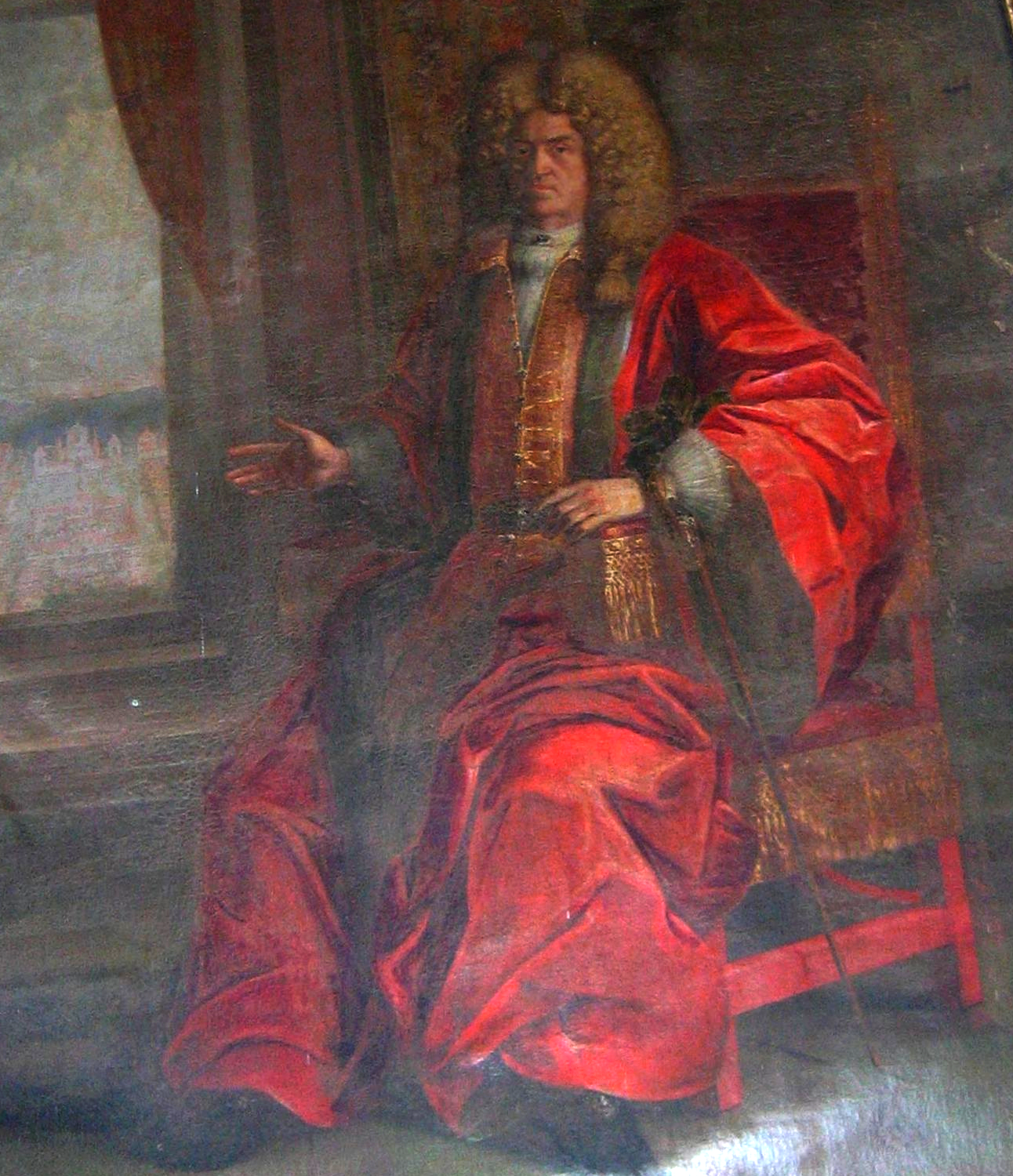 Portrait of Jan Dobrogost Krasiński († 1717)